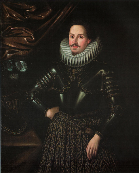 Ritratto del Duca Ferdinando Gonzaga (1587-1626)